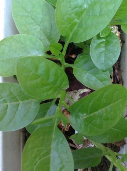 中文（台灣）: 落葵